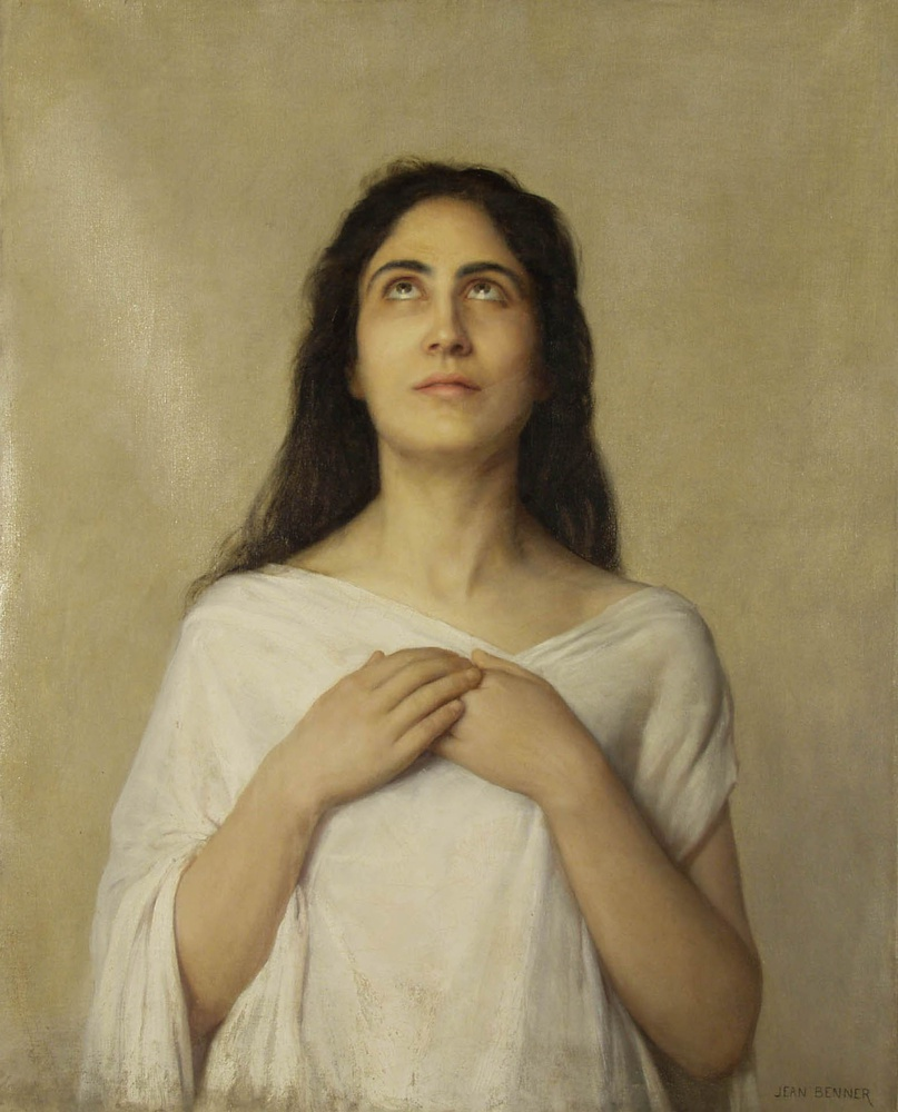 L'ExtaseExtasytitle QS:P1476,fr:"L'Extase" label QS:Lfr,"L'Extase"